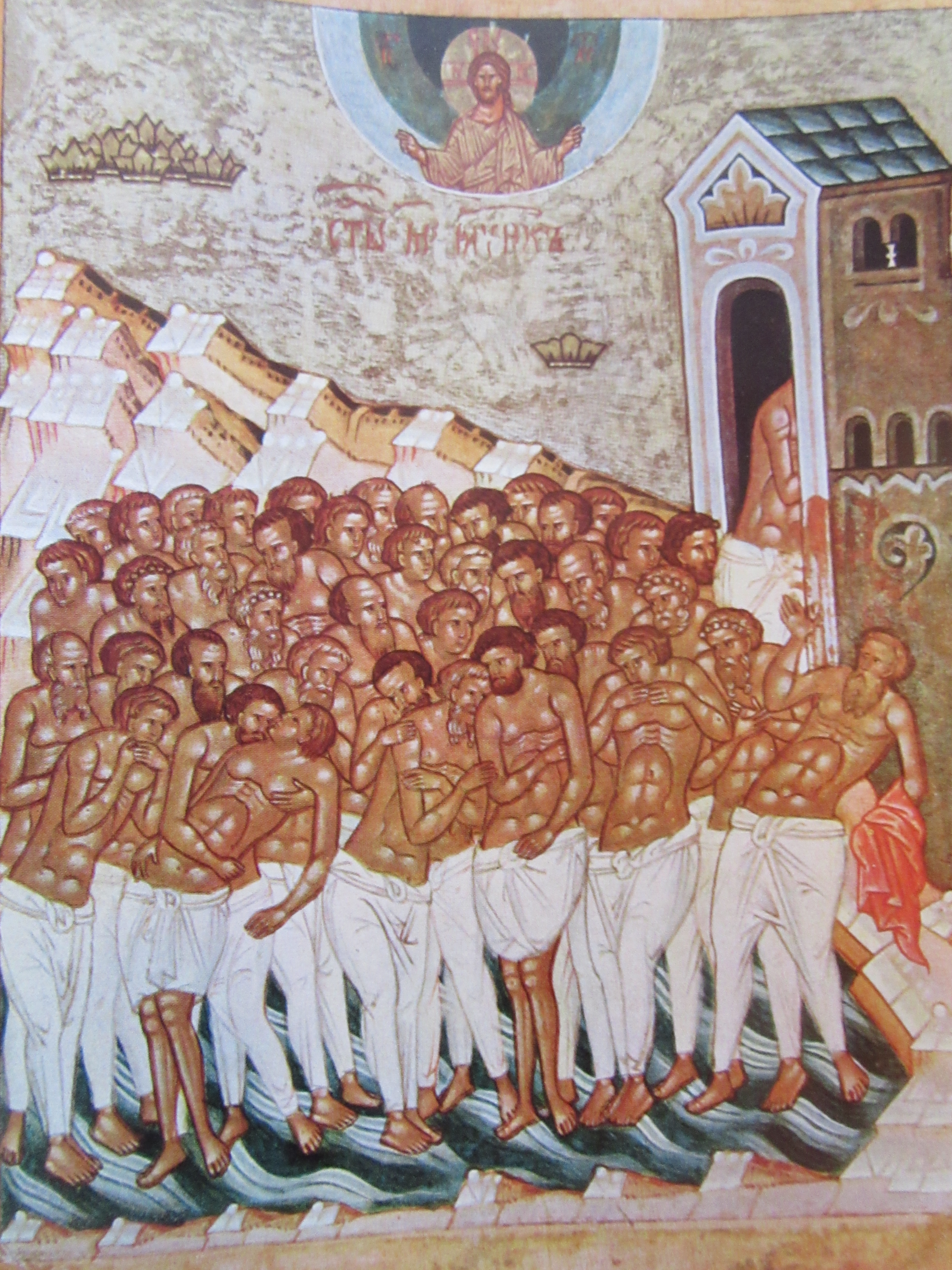 Icône des martyrs de Sébaste